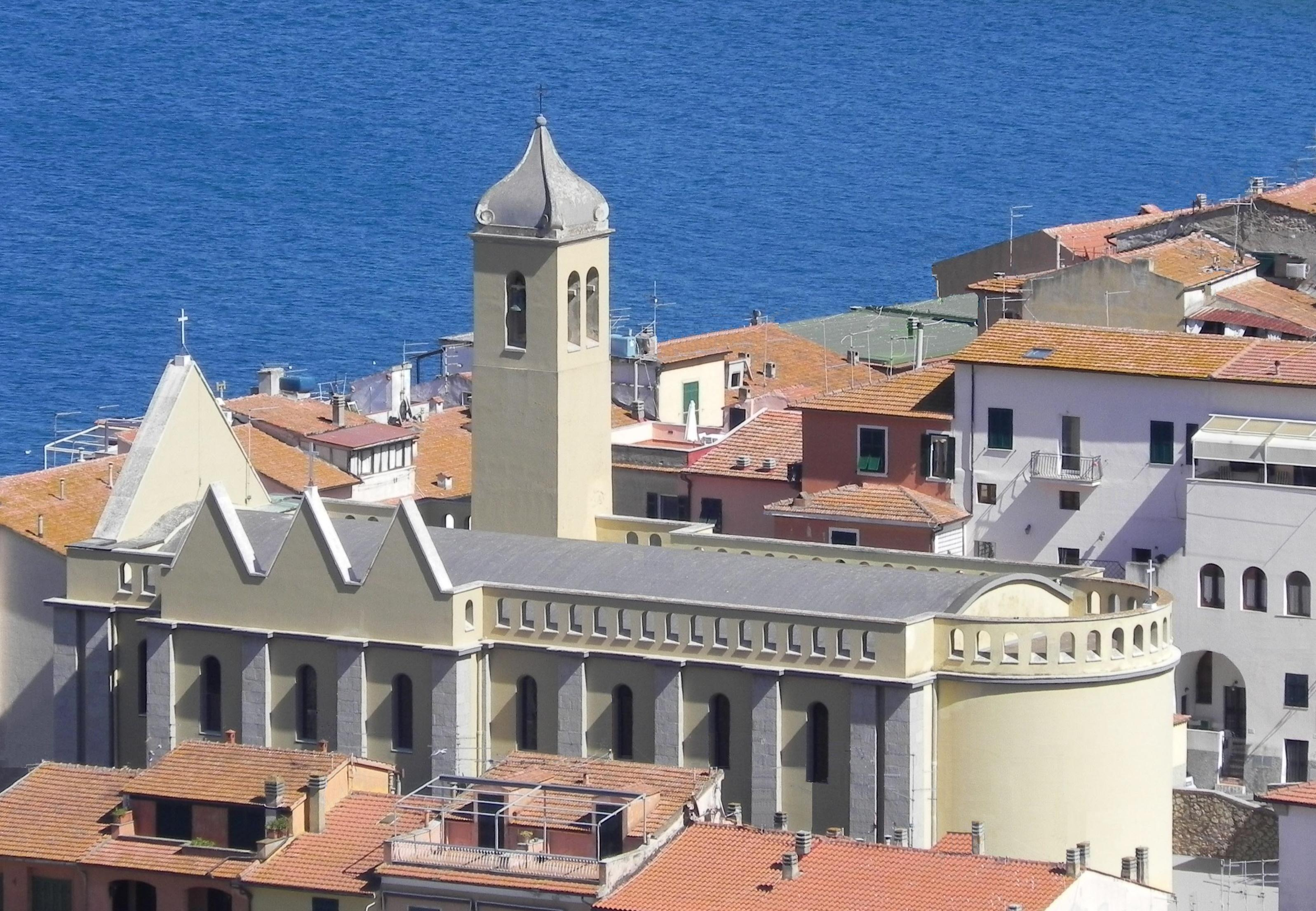 Veduta d'insieme della chiesa principale di Porto Santo Stefano.